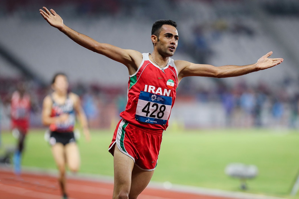 حسین کیهانی در رقابت‌های دو ومیدانی بازی‌های آسیایی ۲۰۱۸